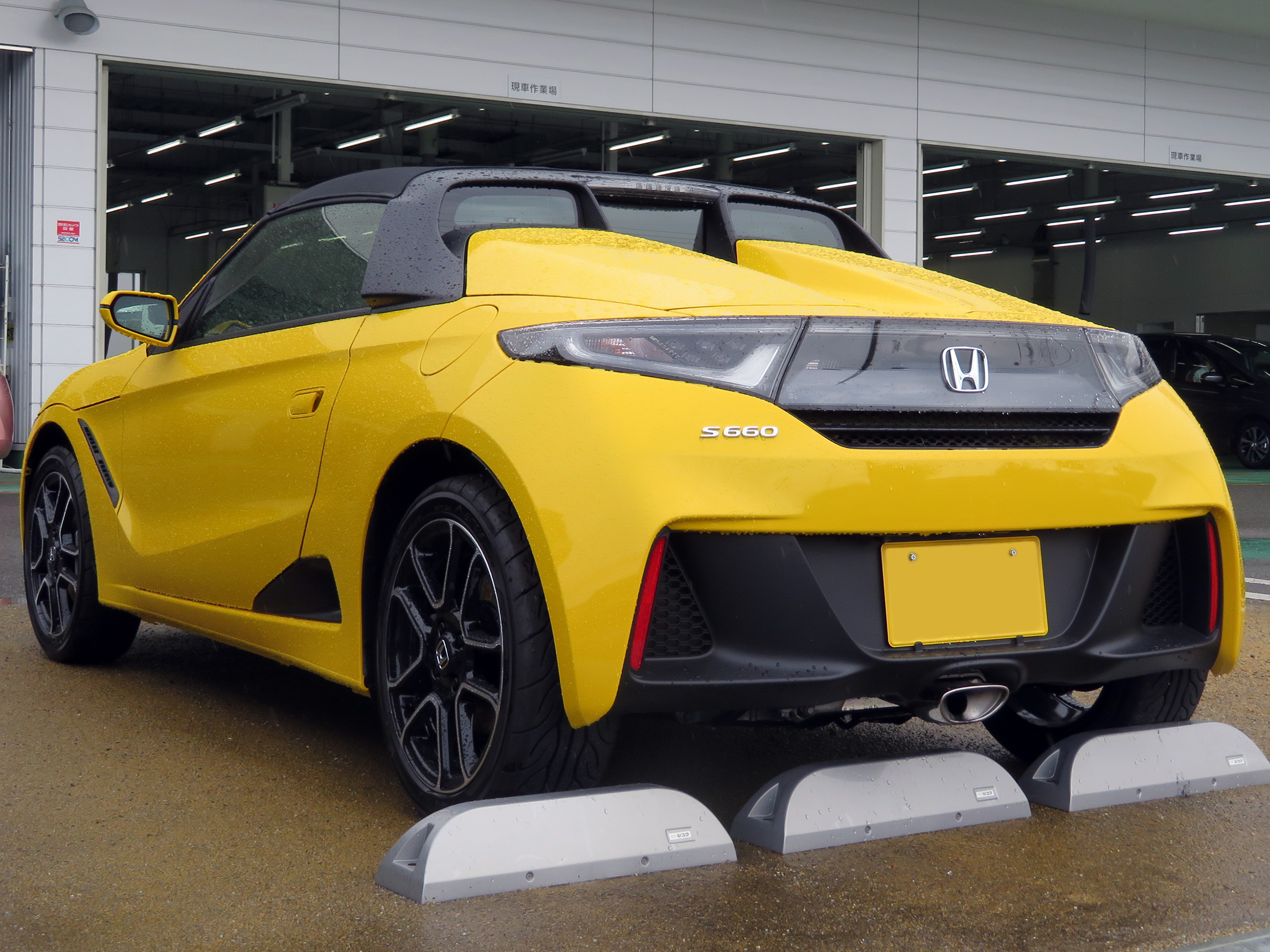 3BA-JW5型ホンダ・S660 αを撮影。